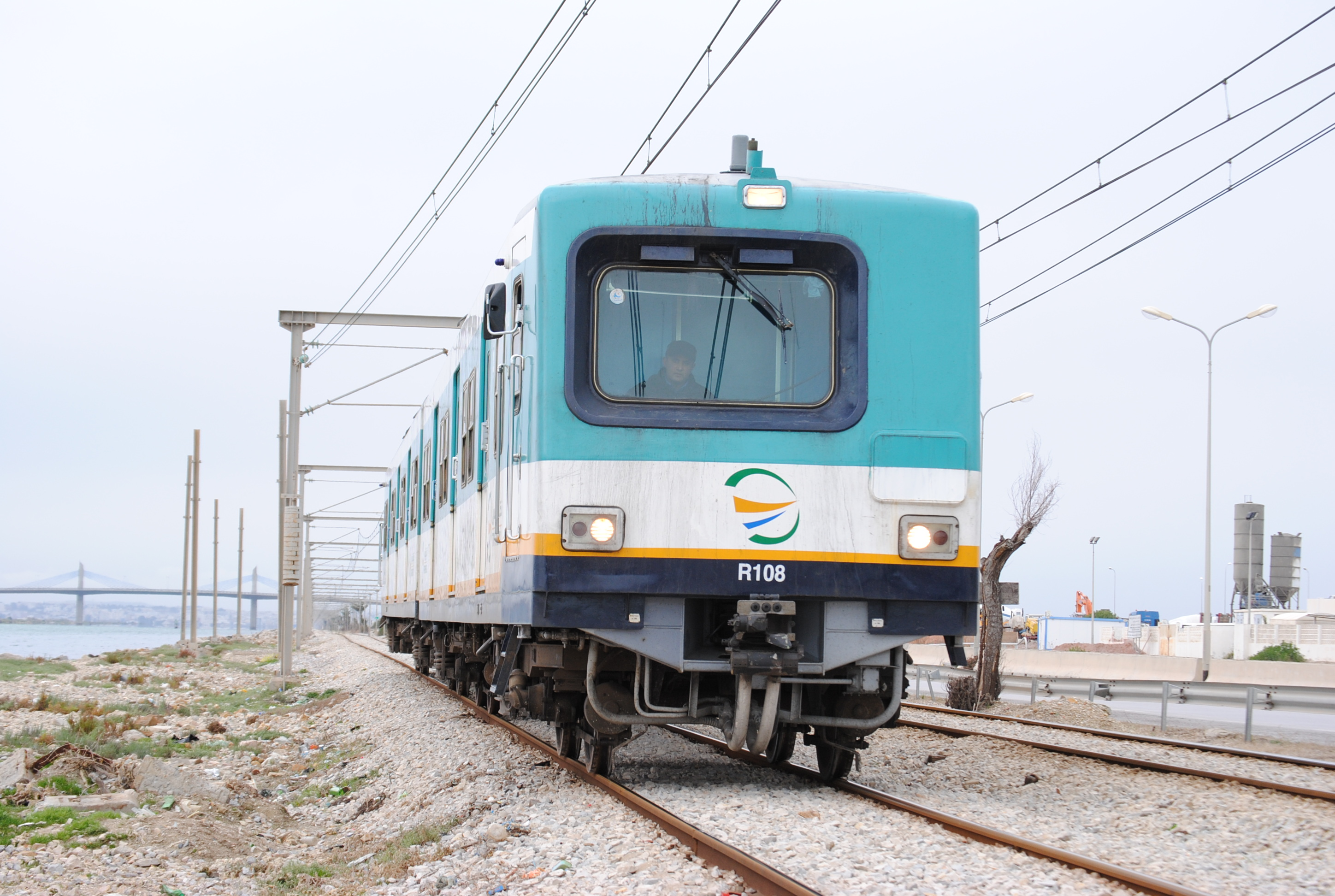 Train TGM